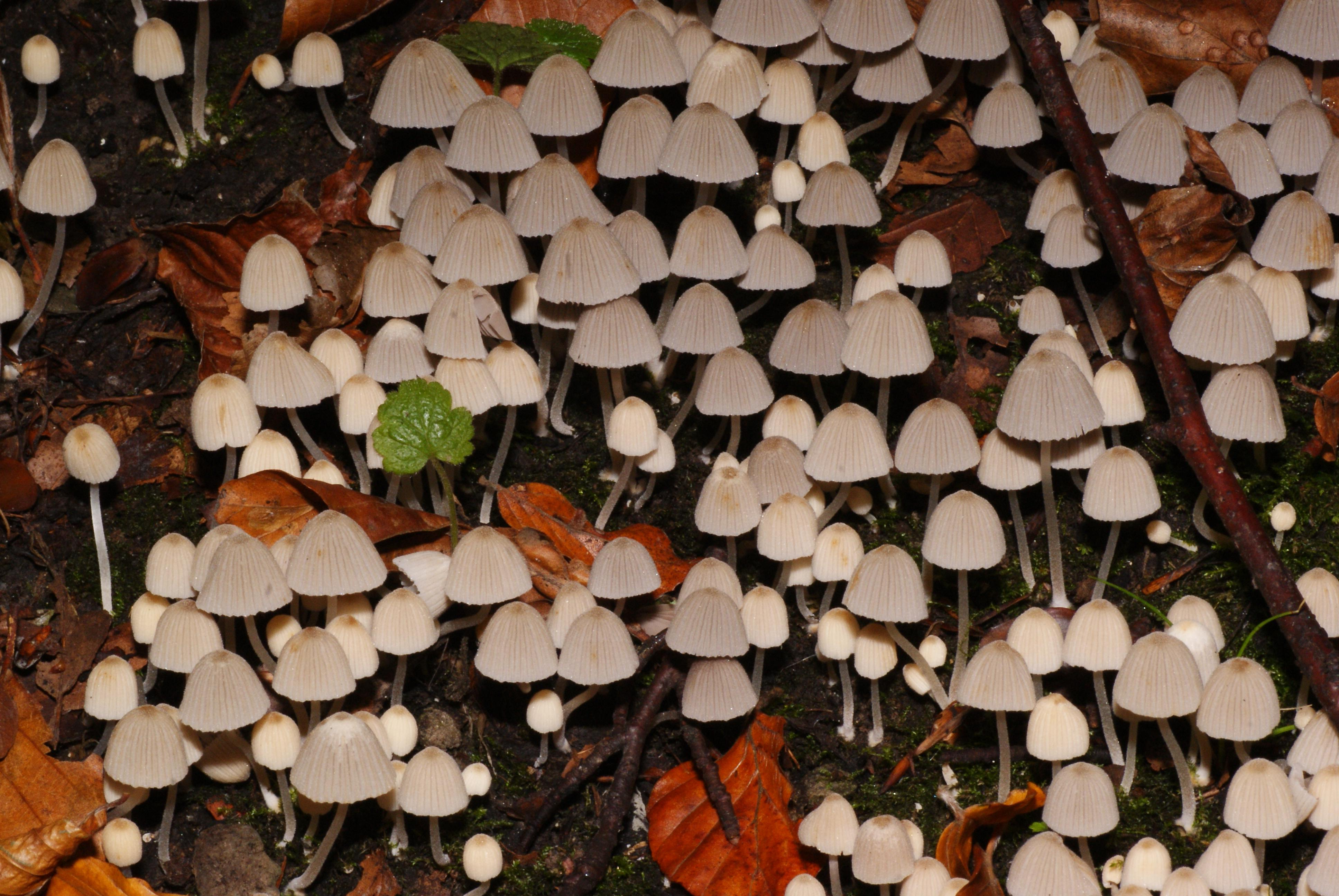 Psathyrella pigmaea